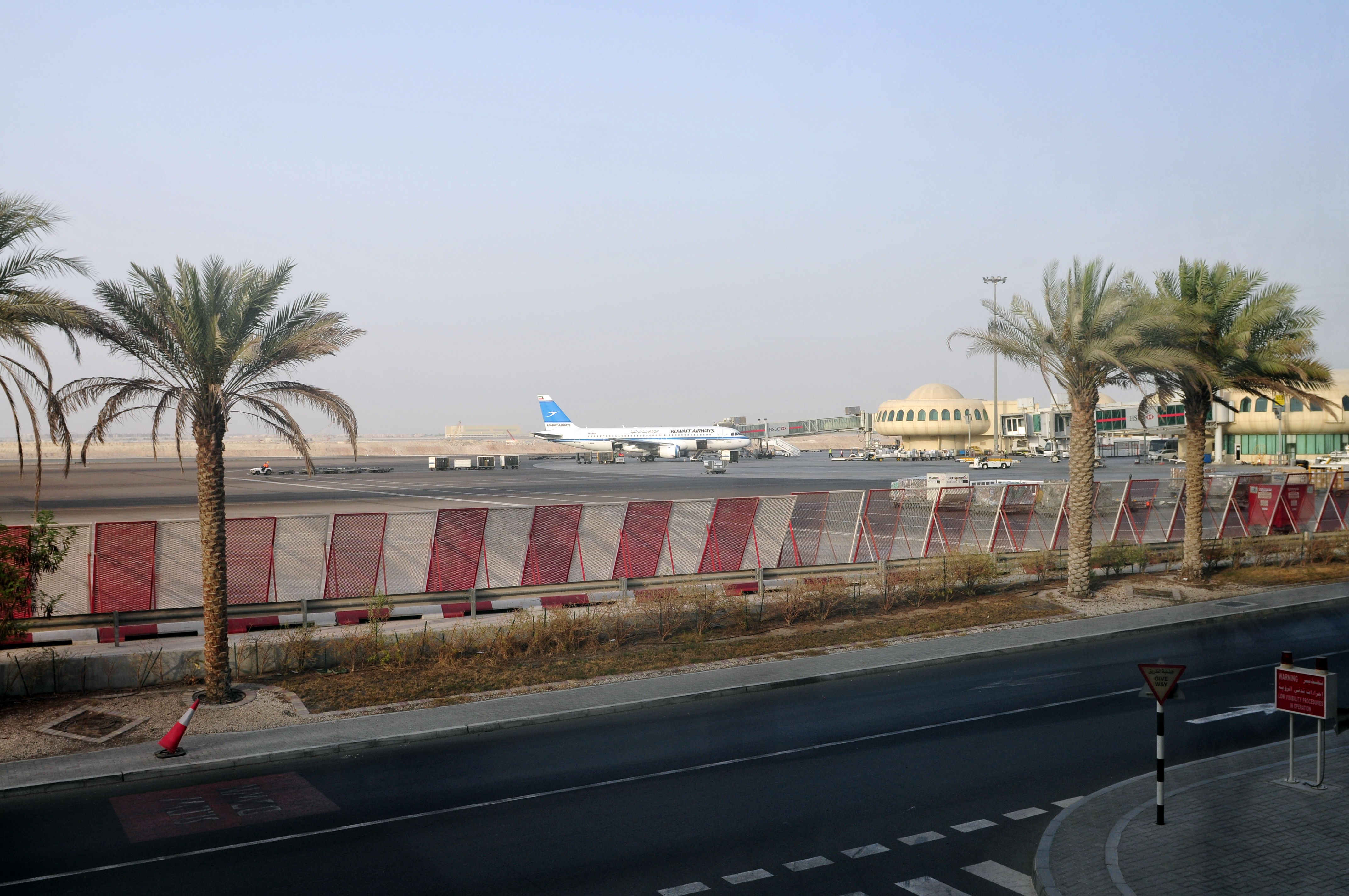 Wikimania 2013 Hongkong